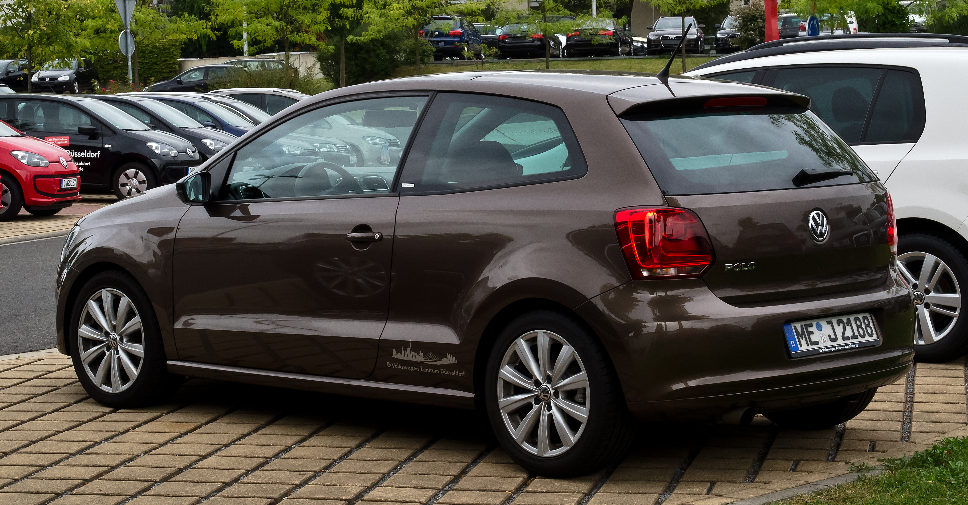 VW Polo Style (V)